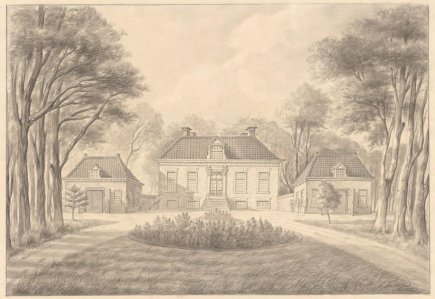 Gezicht op het huis Vaartzicht tussen Kollum en Oudwoude. De tekening is vervaardigd voor de afbraak van het pand in 1877.